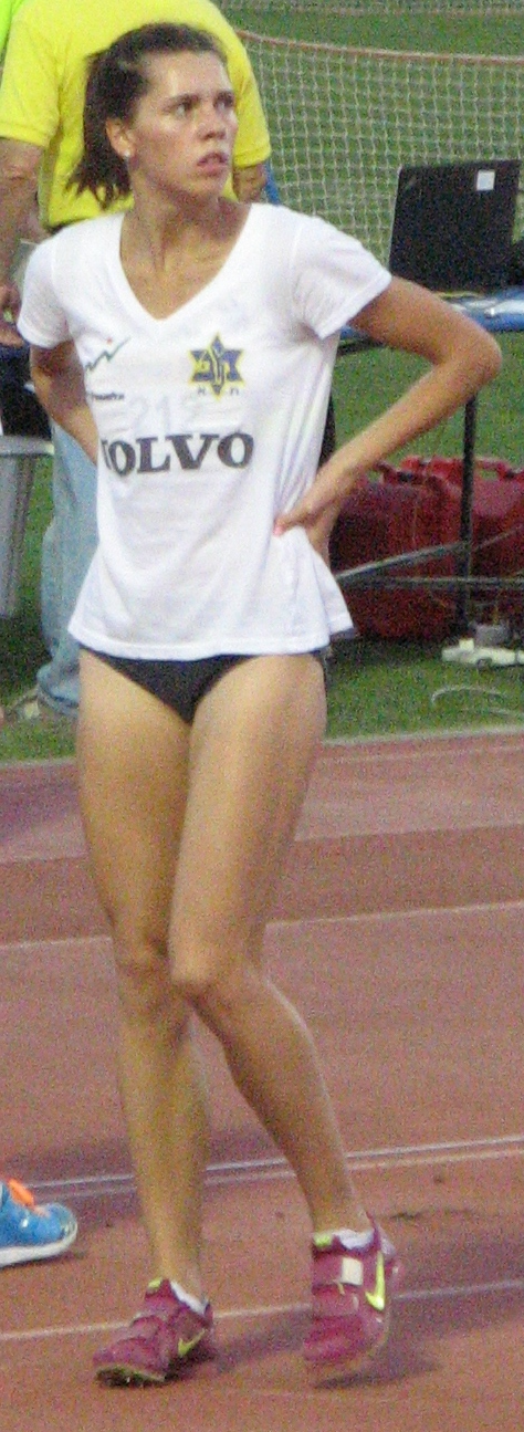 קופצת המשולשת האוקראינית הישראלית חנה קנייזבה-מיננקו במהלך היום הראשון של אליפות ישראל באתלטיקה קלה לשנת 2015.